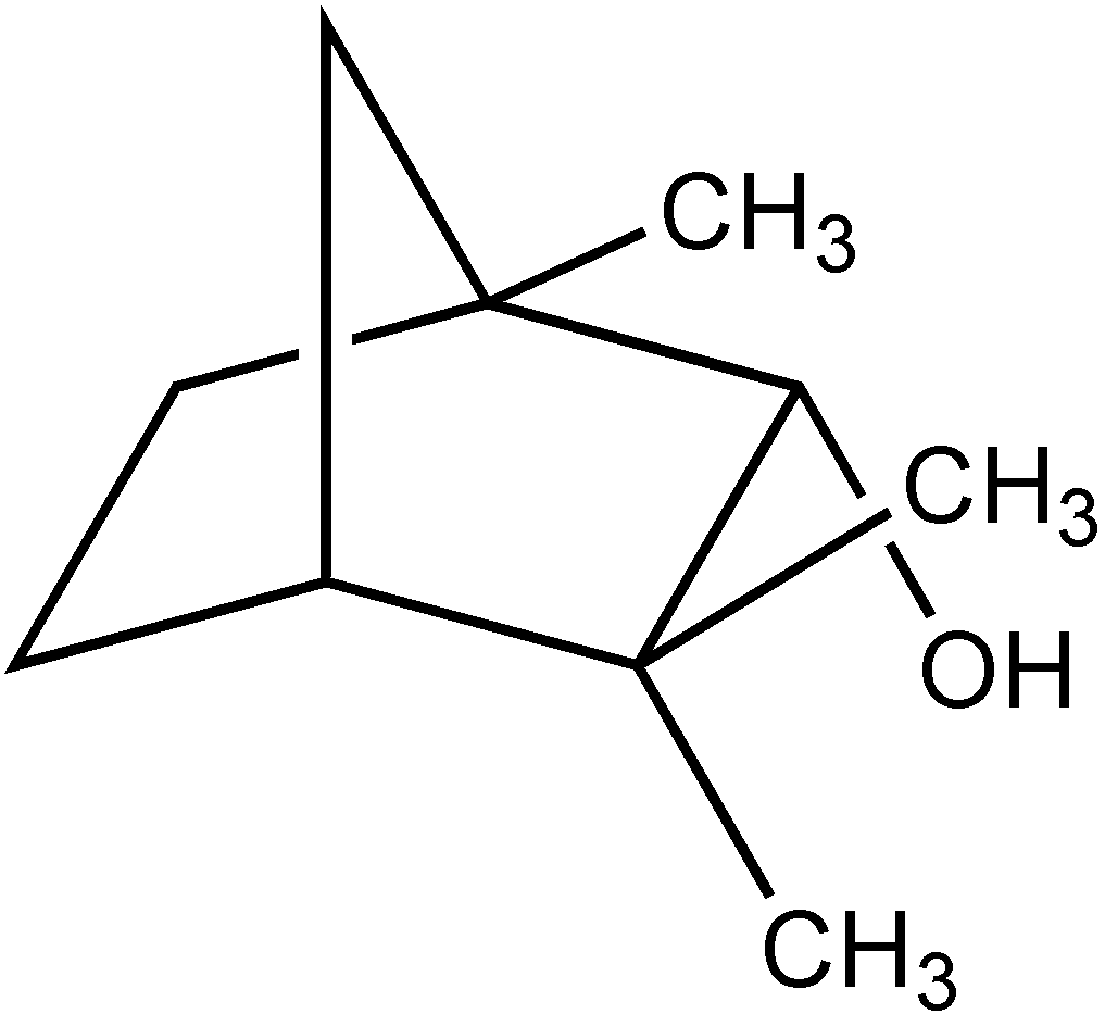 Struktur von Fenchol